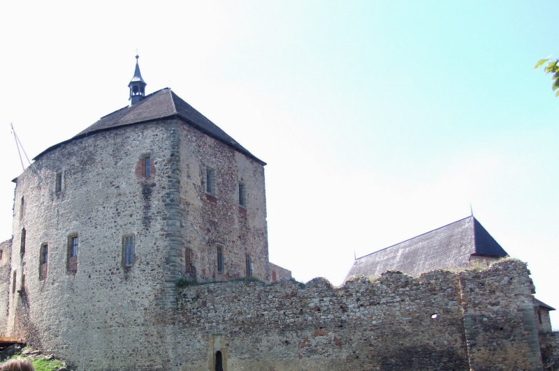 Burg Tocnik